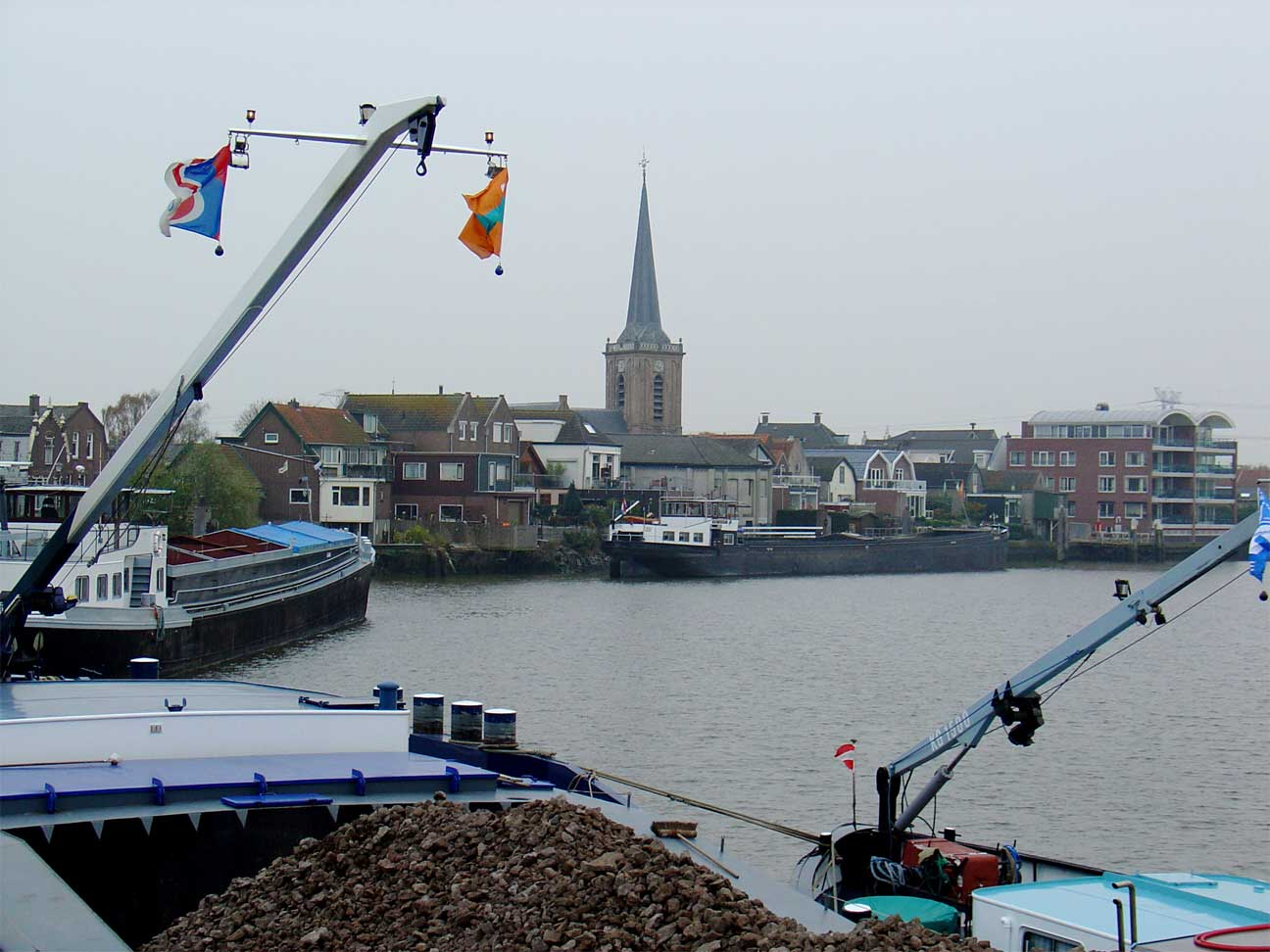 Zicht op Ouderkerk aan den IJssel